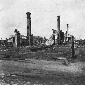 Dünaburg Juli 1941